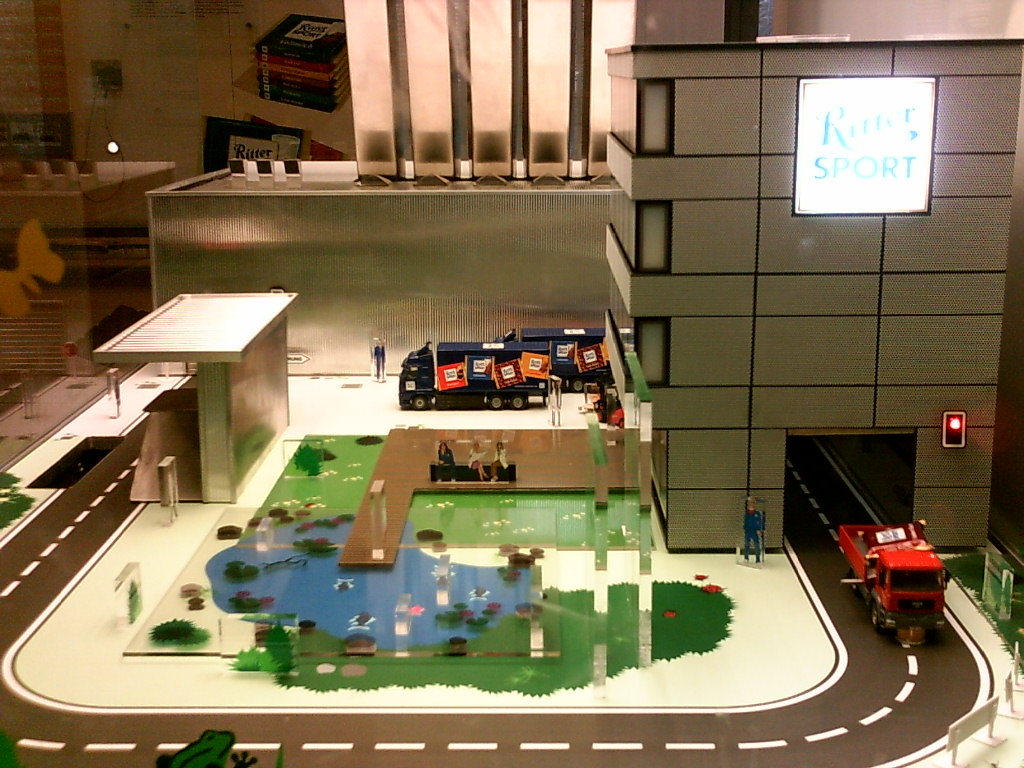 Schokoladenautomat im Schokoladenmuseum von Ritter Sport in Waldenbuch. Geplant und konstruiert von den mechatronischen Auszubildenden der Firma Ritter-Sport: Andreas Necker, Kay Dreher, Dayan Haberer, Manuel Schnee, Eldin Mujakovic und Daniel Neusser